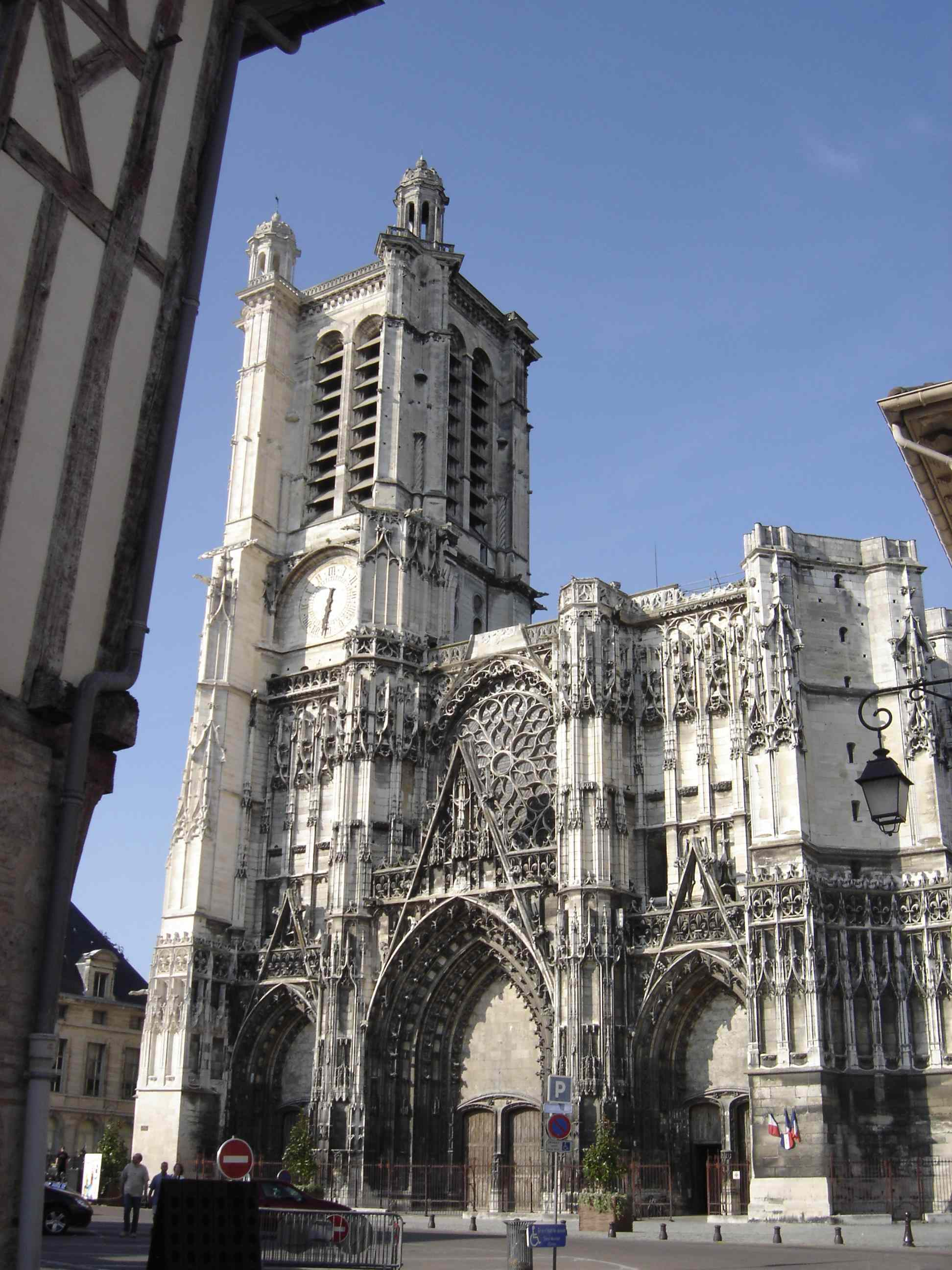 Cathédrale des SS Pierre et Paul à Troyes Façade occidentale